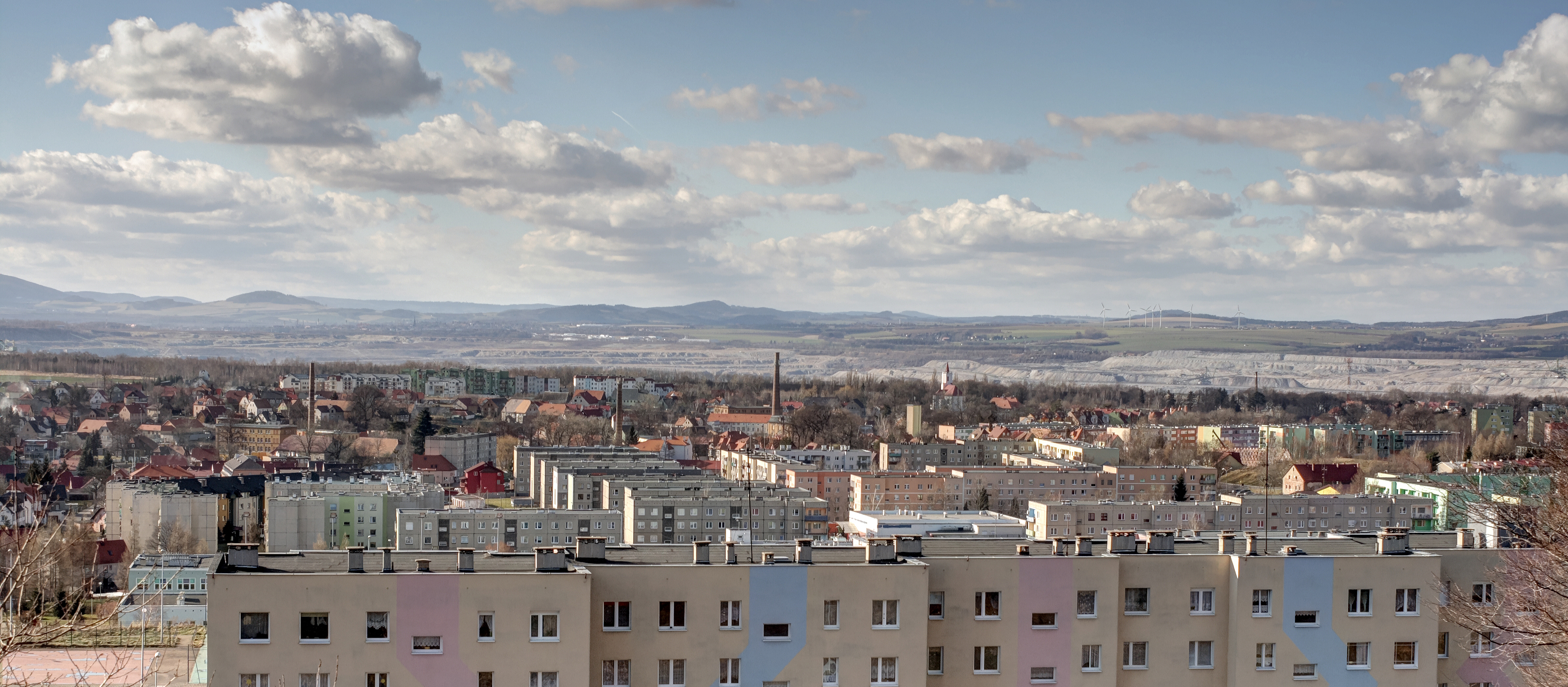 Bogatynia - panorama miasta